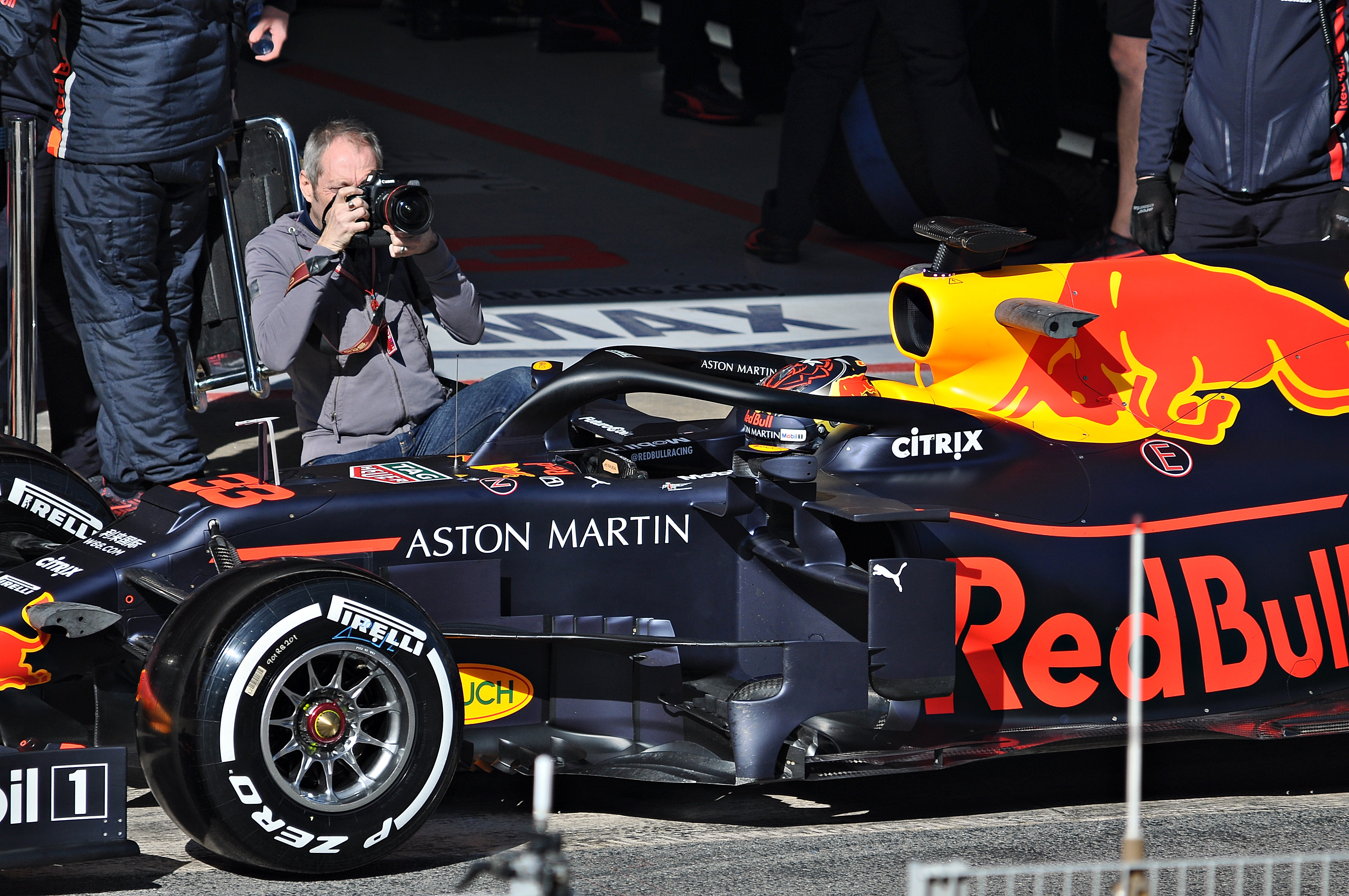 Test Days-Circuito de Catalunya